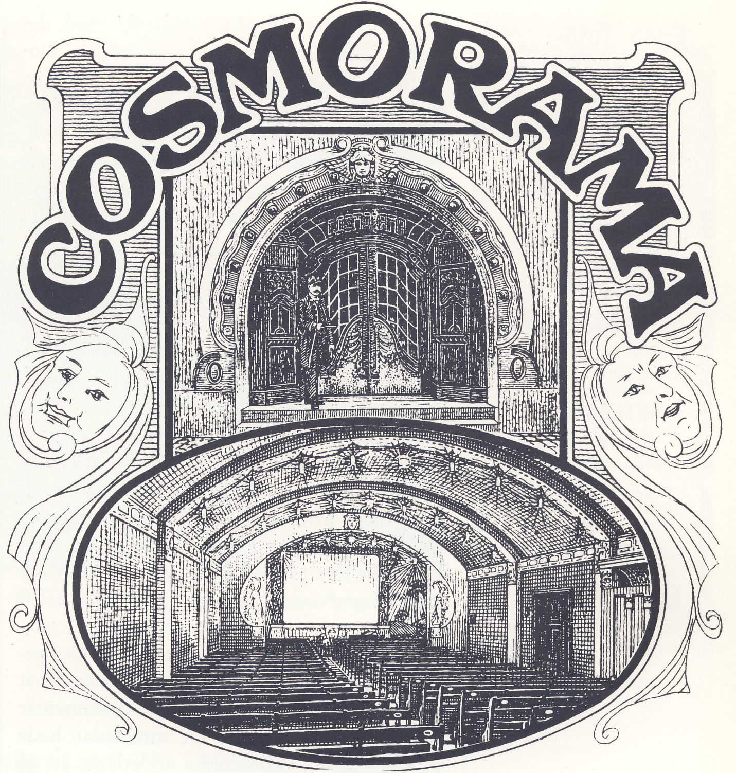 Tidningsannons för biografen "Cosmorama" i Göterborg